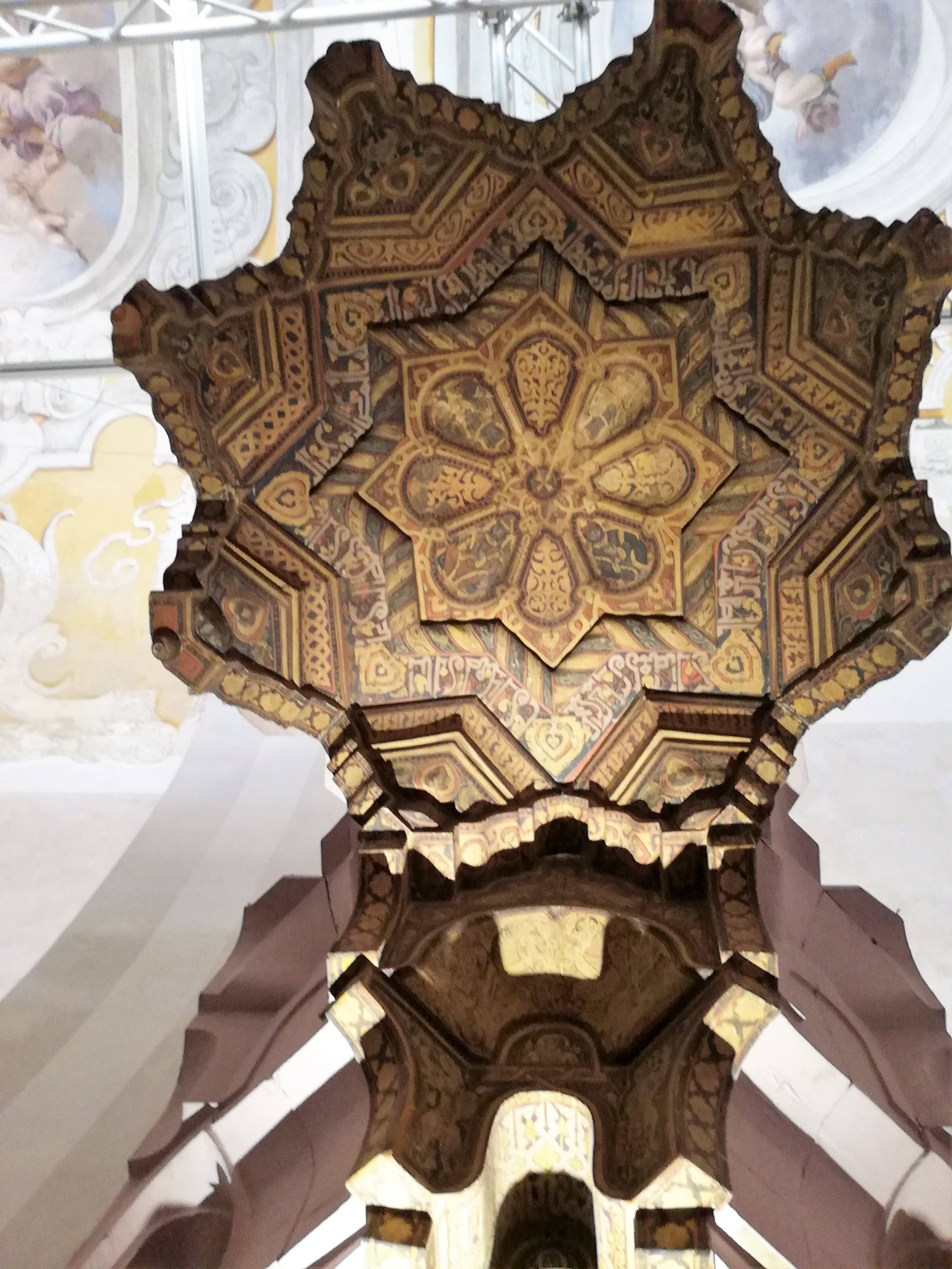 Palazzo dei normanni, particolare tetto alveolare con inscrizzioni arabi delle Sale Montalto.